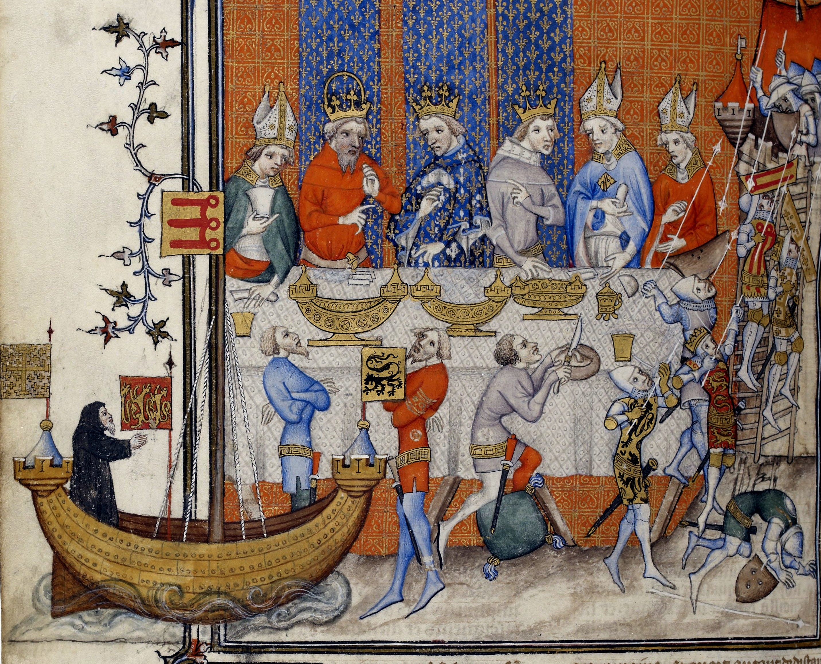 Devant les trois souverains (Charles IV avec la couronne fermée, Charles V au centre, vêtu d'une robe fleurdelisée, et Wenceslas à droite} entourés par des évêques, se déroule le grand entremets. Les entremets étaient des spectacles prévus pour égayer les longs banquets officiels. Une représentation est alors donnée en ce jour des Rois 1378. Il s'agit de la première croisade : Godefroy de Bouillon débarque en Terre Sainte dans sa nef et s'empare de Jérusalem défendue par des Sarrasins.